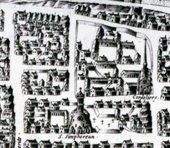 partie du plan Picart.